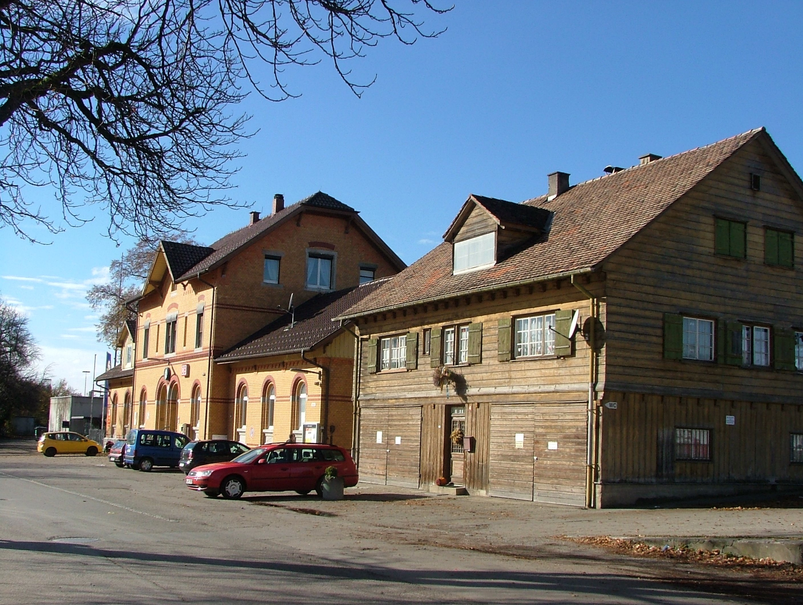 Bahnhofstraße